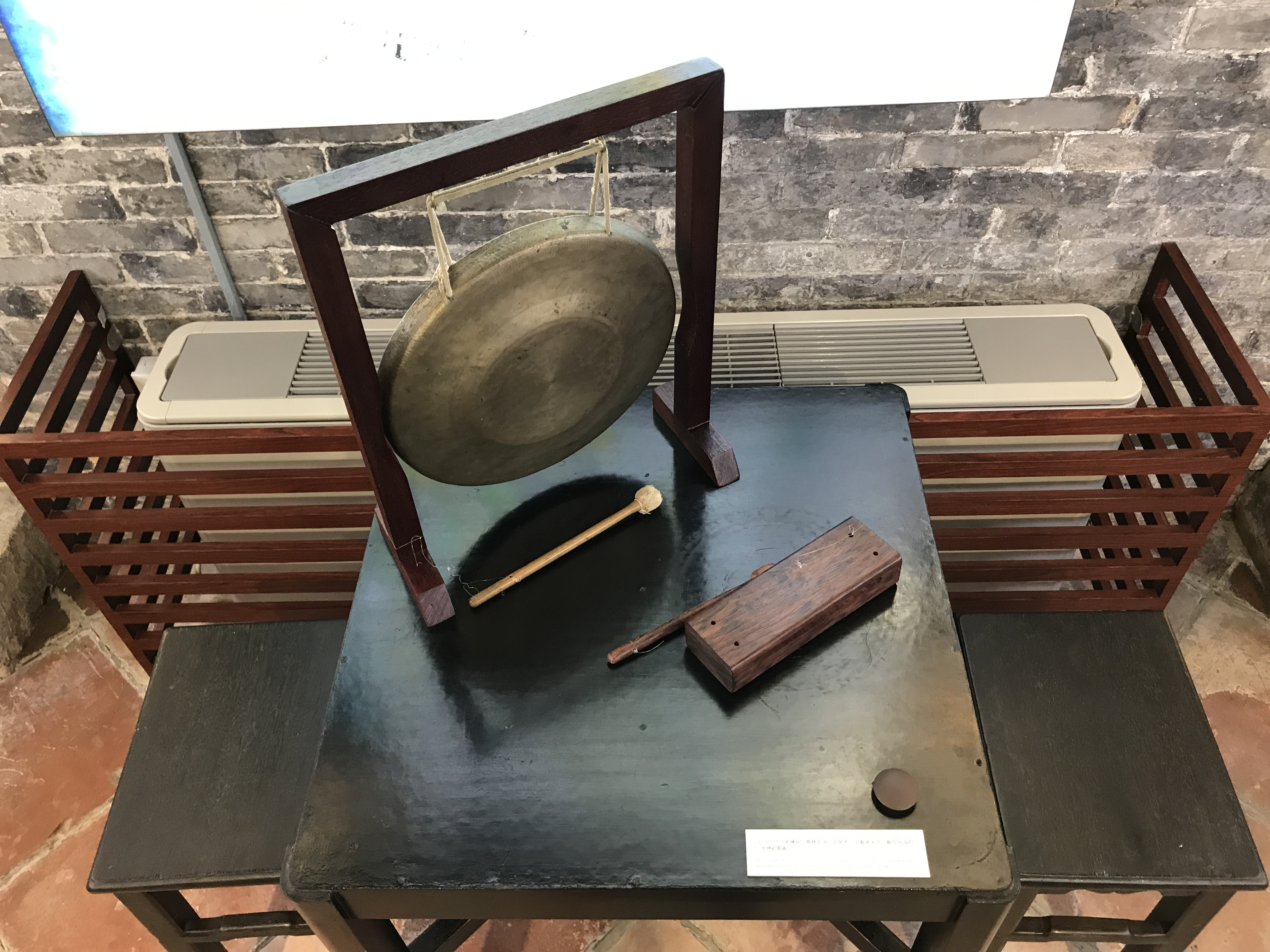 中文（台灣）: 沙梨頭更館內的打更工具。